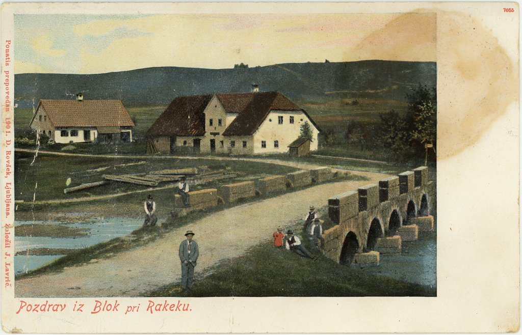 Razglednica Velikih Blok.